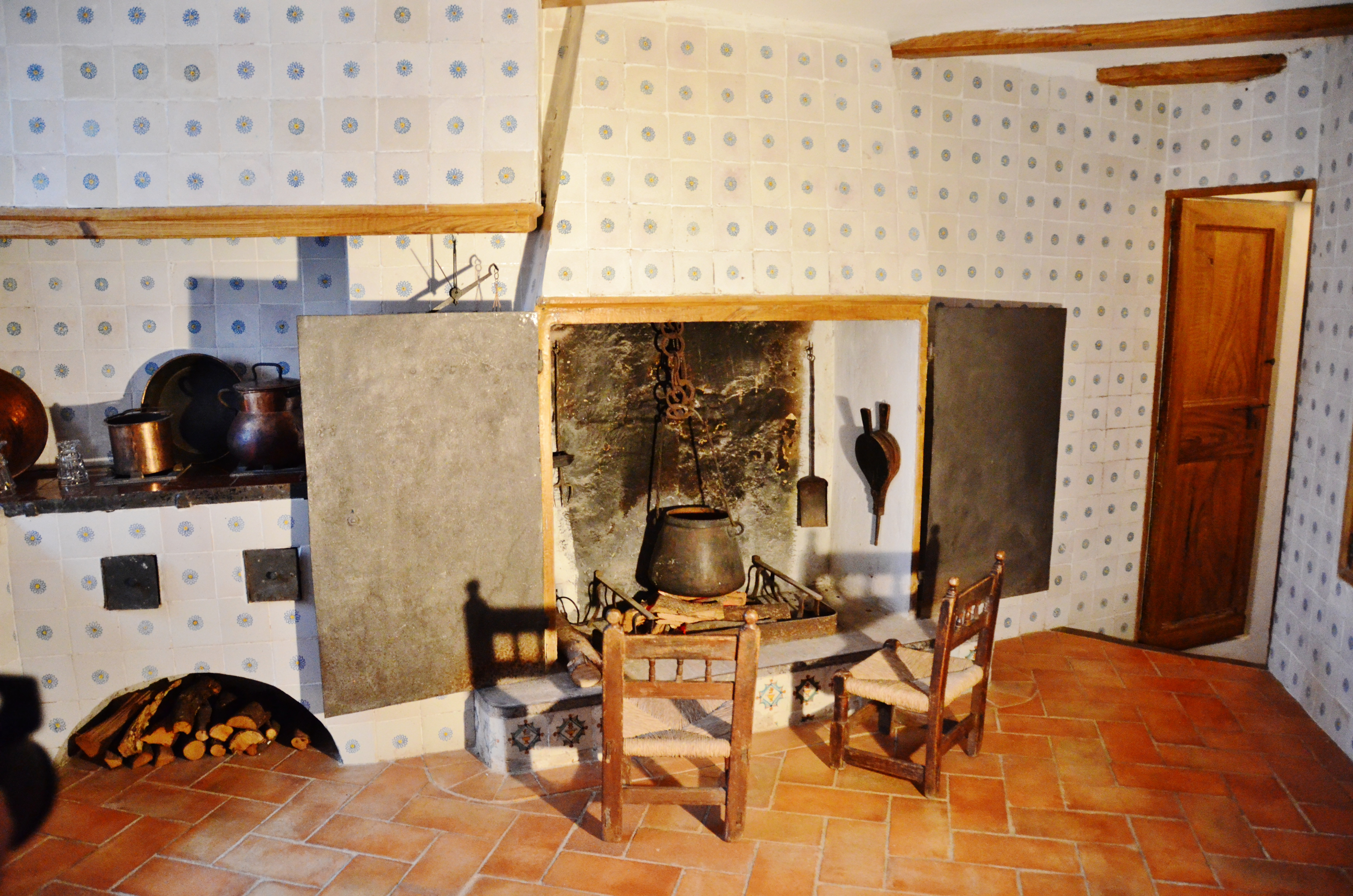 Cuina noble del Museu Romàntic Can Papiol, Vilanova i la Geltrú.